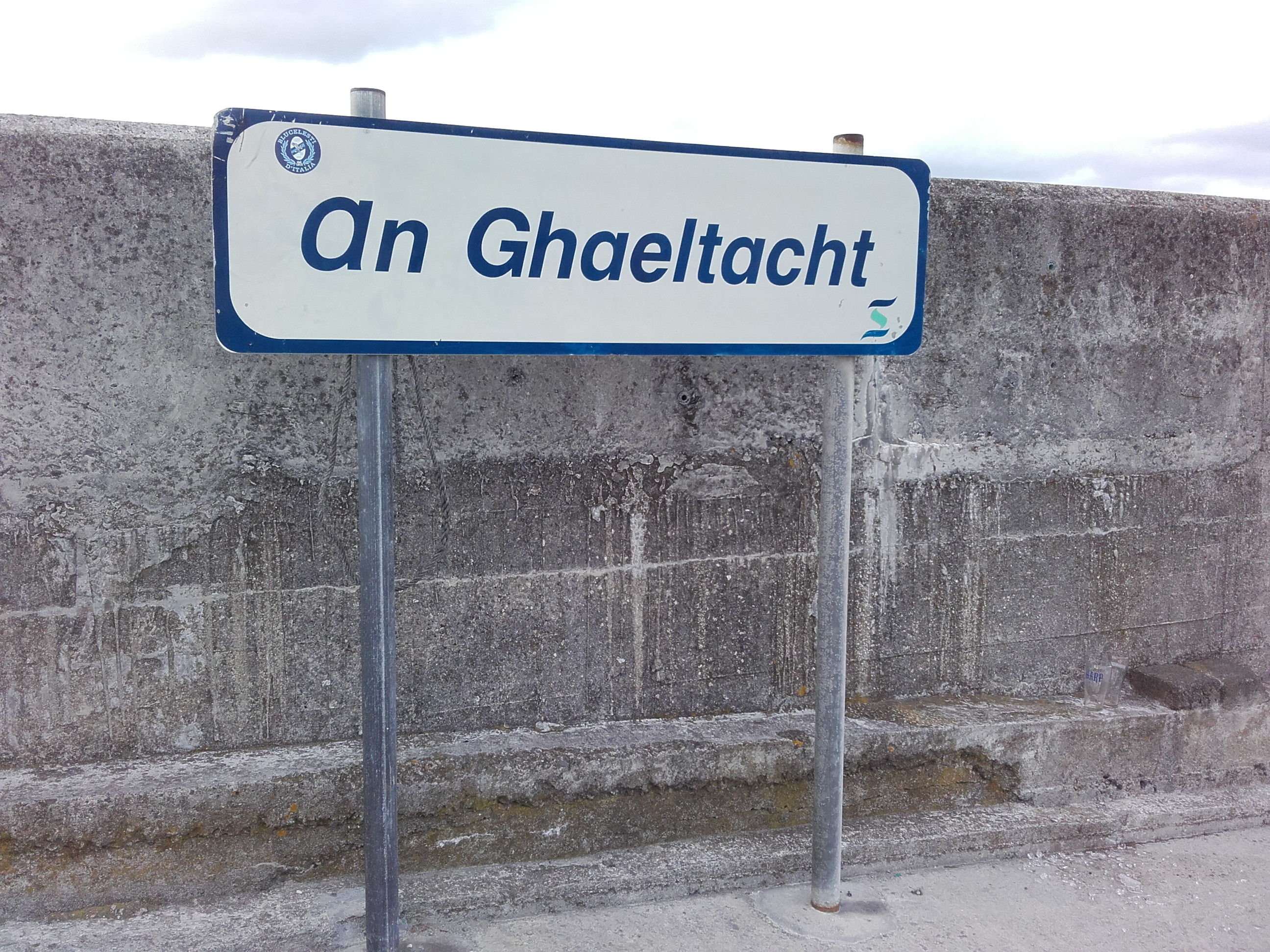 An Ghaeltacht (Inis Oírr).